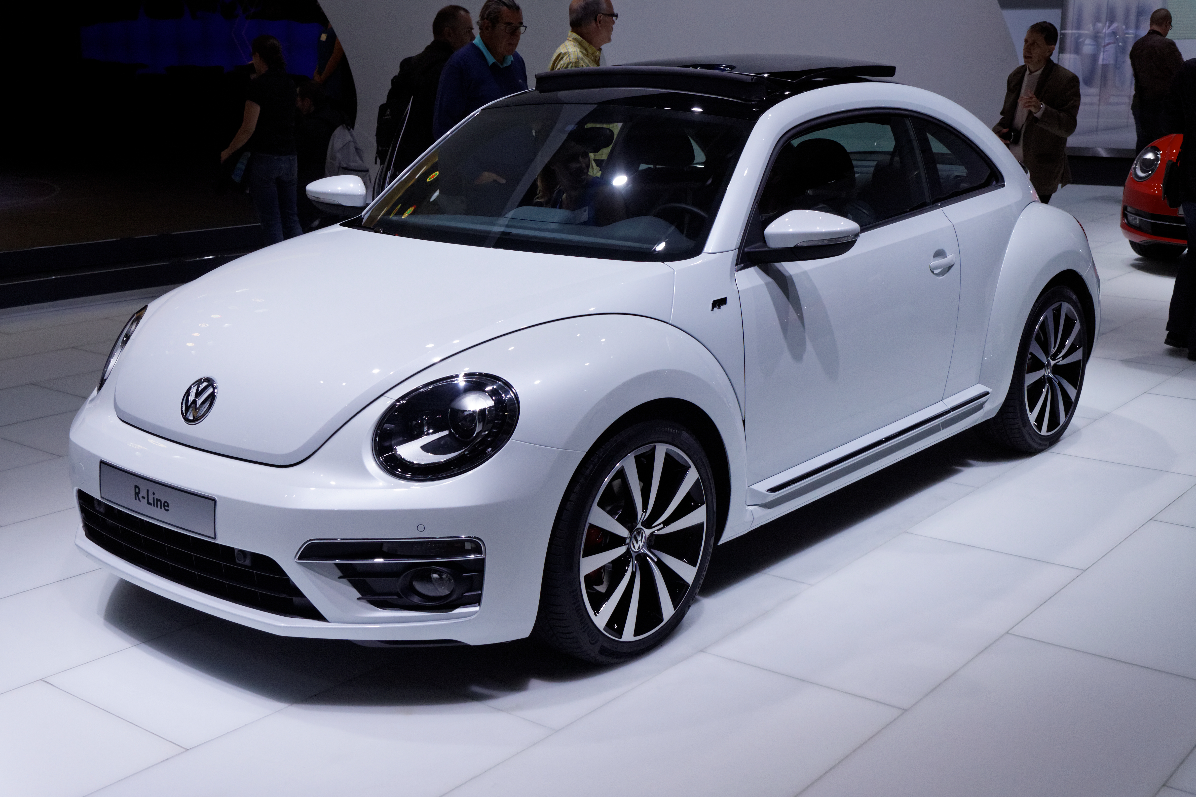 Une Volkswagen Beetle présentée lors du Mondial de l'Automobile de Paris 2012.